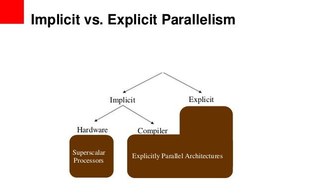 Мультипроцесорна архітектура